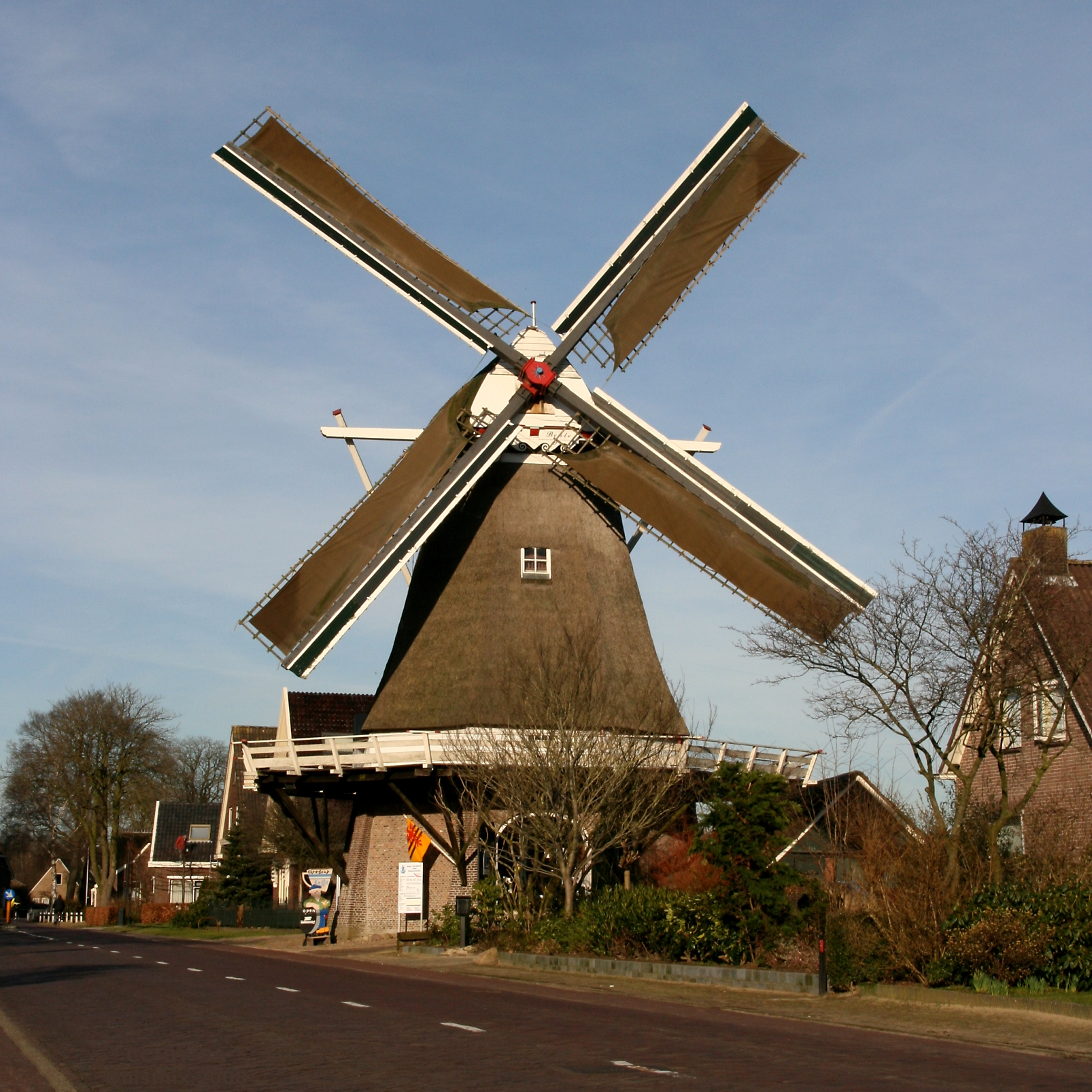 Dalen: windmolen De Bente